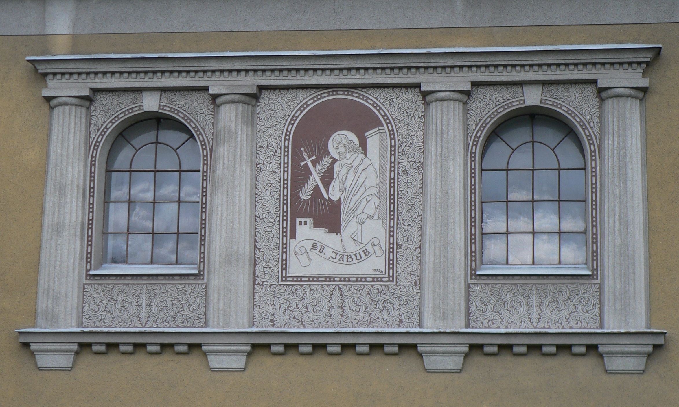 Kostel svatého Jakuba Většího (Lesnice) - moderní reliéf na stěně kostela